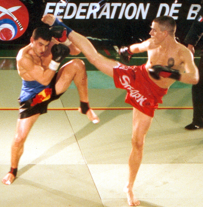 lethwei2005.jpg